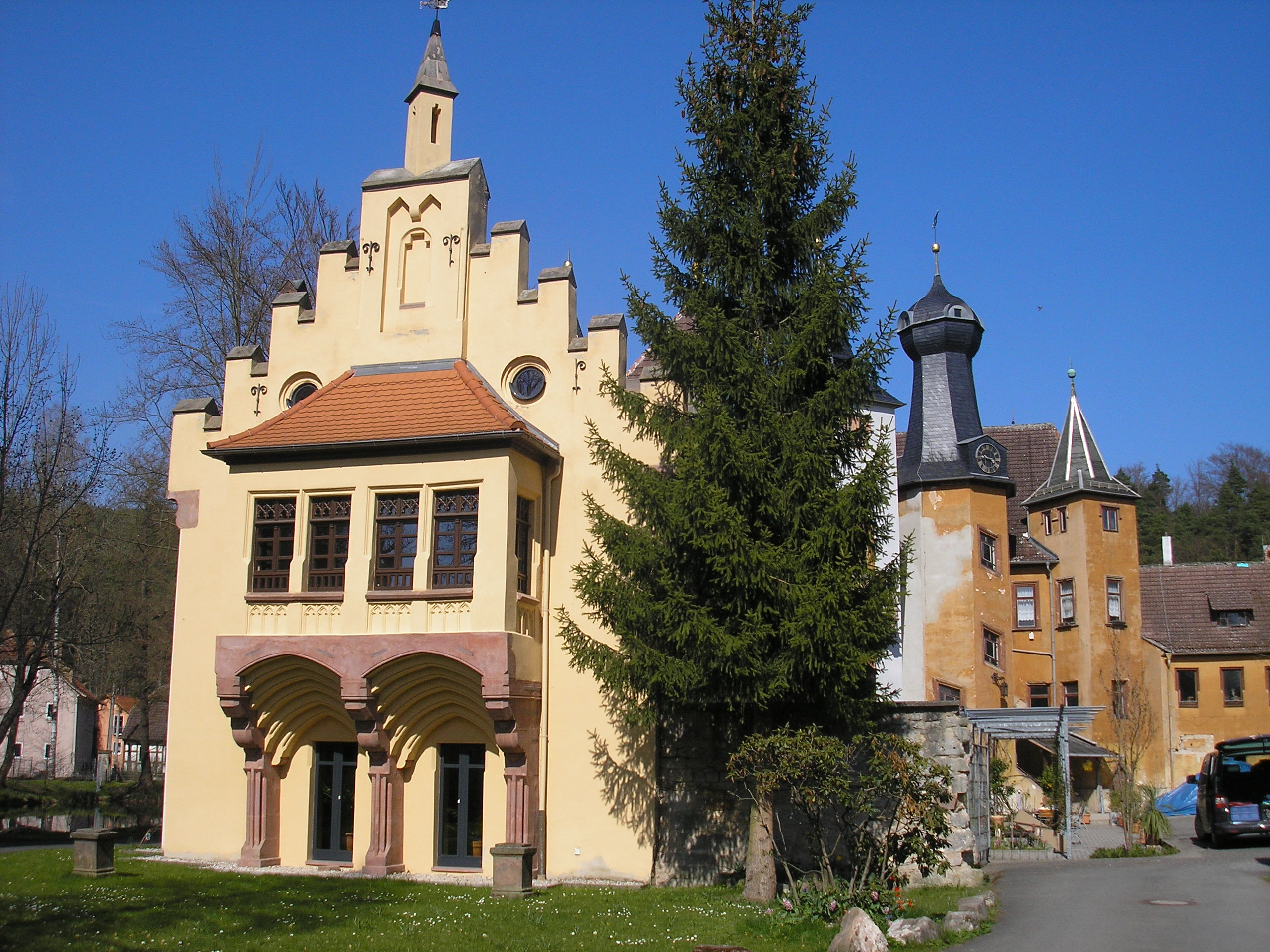 Das Schloss Fröhliche Wiederkunft in Wolfersdorf (Thüringen).